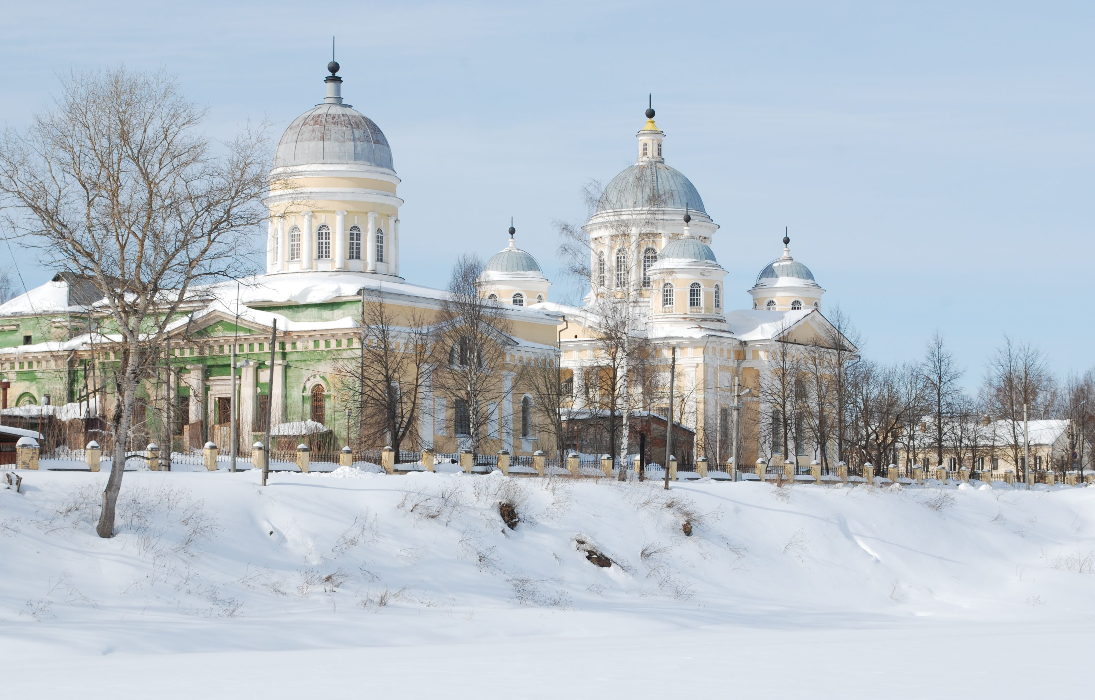 Собор Входа Господня в Иерусалим (Входоиерусалимский) (Тверская область, Торжок, Новгородская улица, 5-а)